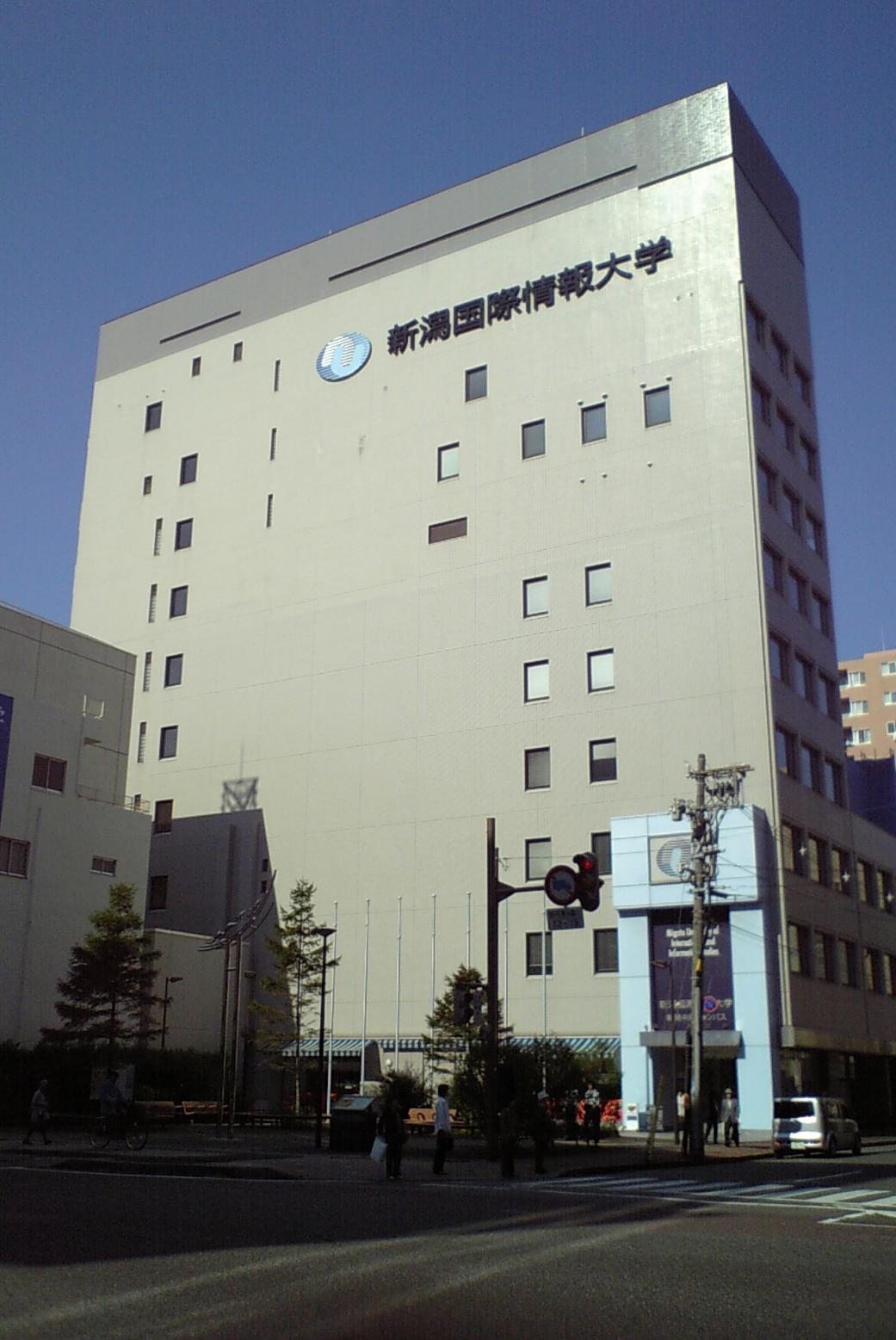 新潟国際情報大学の新潟中央キャンパス。